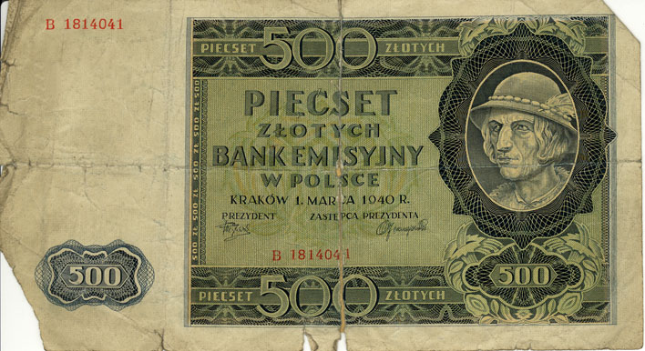 500 złotych = 250 Reichsmark